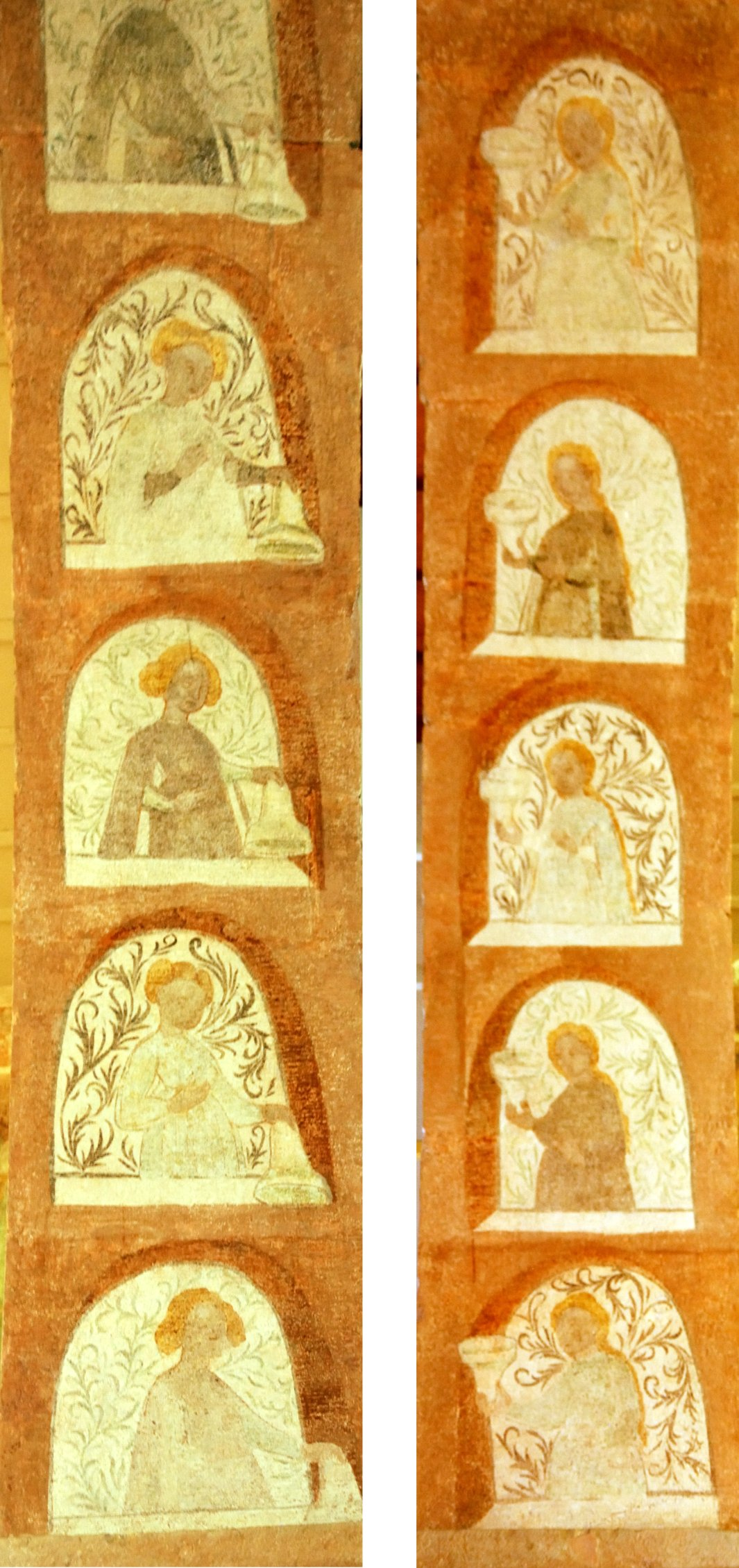 Peterskirche Blansingen: Wandbild am Chorbogen von den Törichten und Klugen Jungfrauen